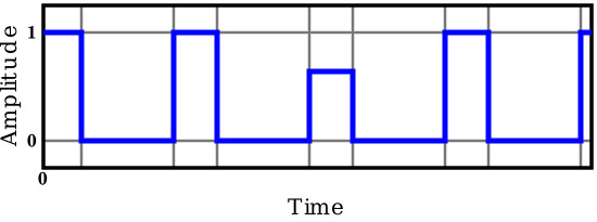 Runt pulse. It is modified from Dutycycle.svg.